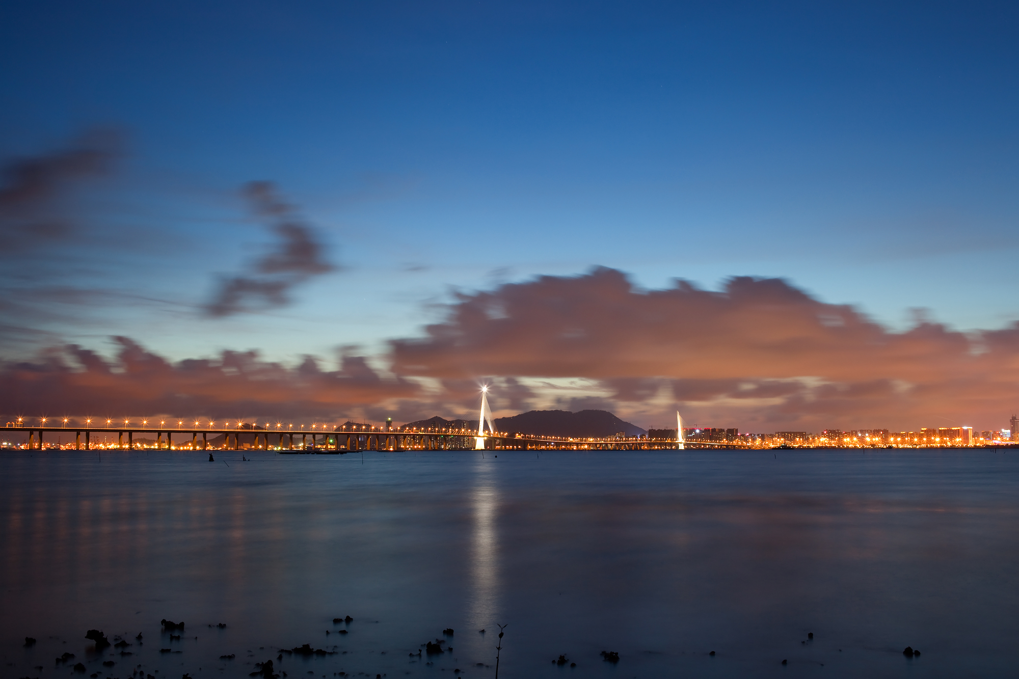 Shenzhen Bay Bridge